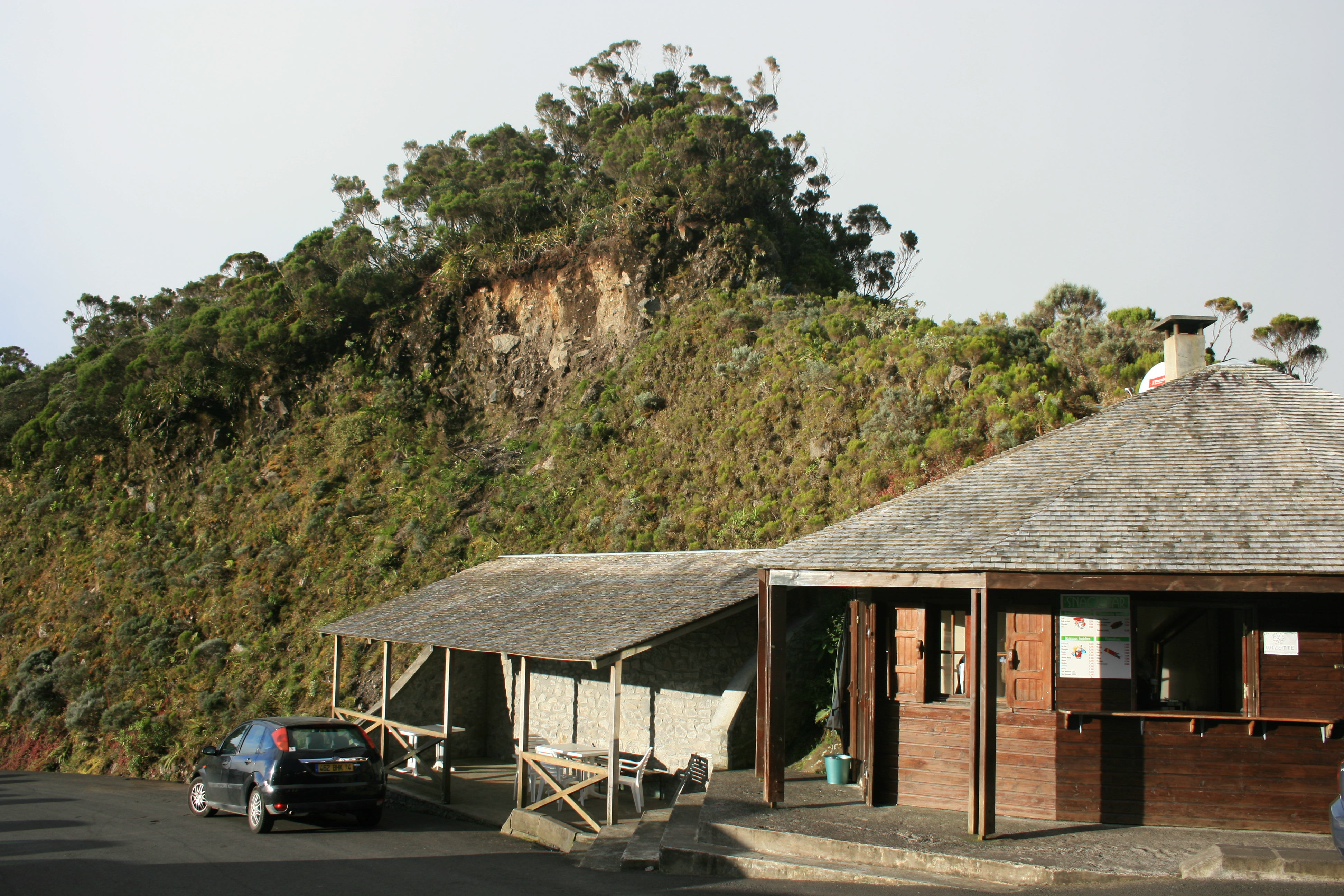 Le bâtiment servant d'accueil au parking du Petit Col, dans les Hauts de la Réunion